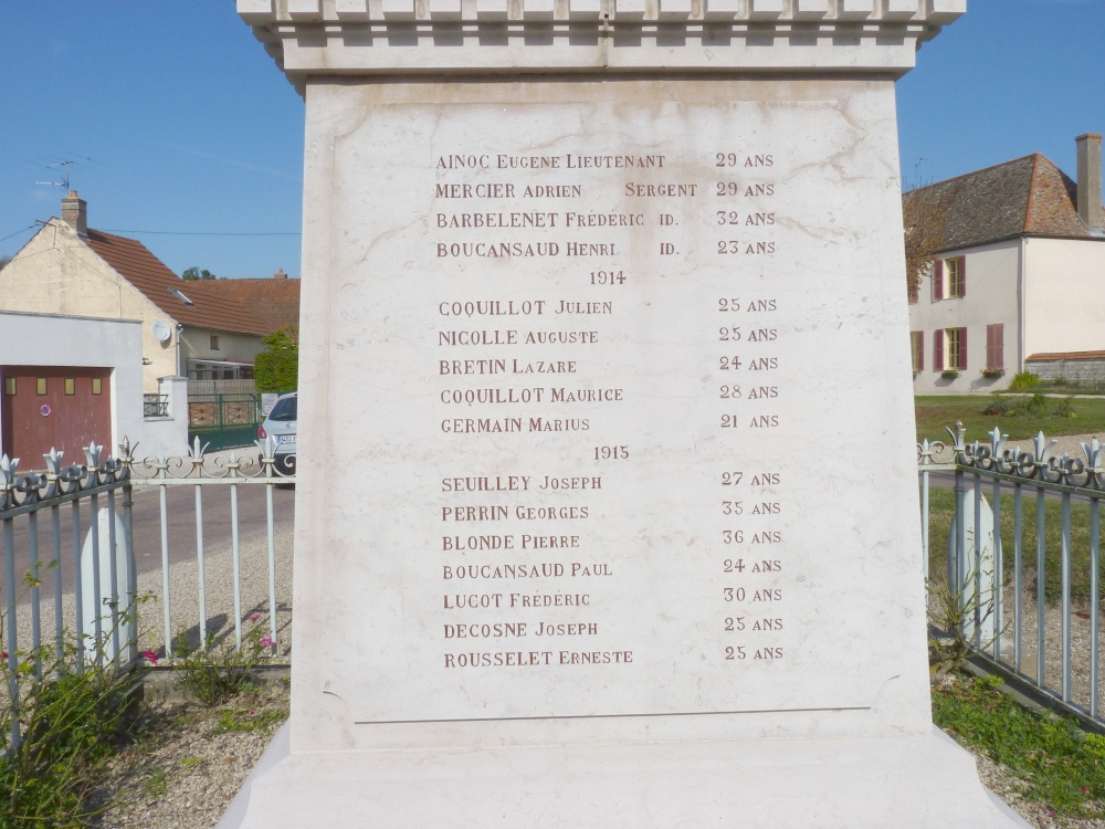 Monument aux morts à Pagny-le-Château, liste des victimes (Côte d'Or, Bourgogne, France)